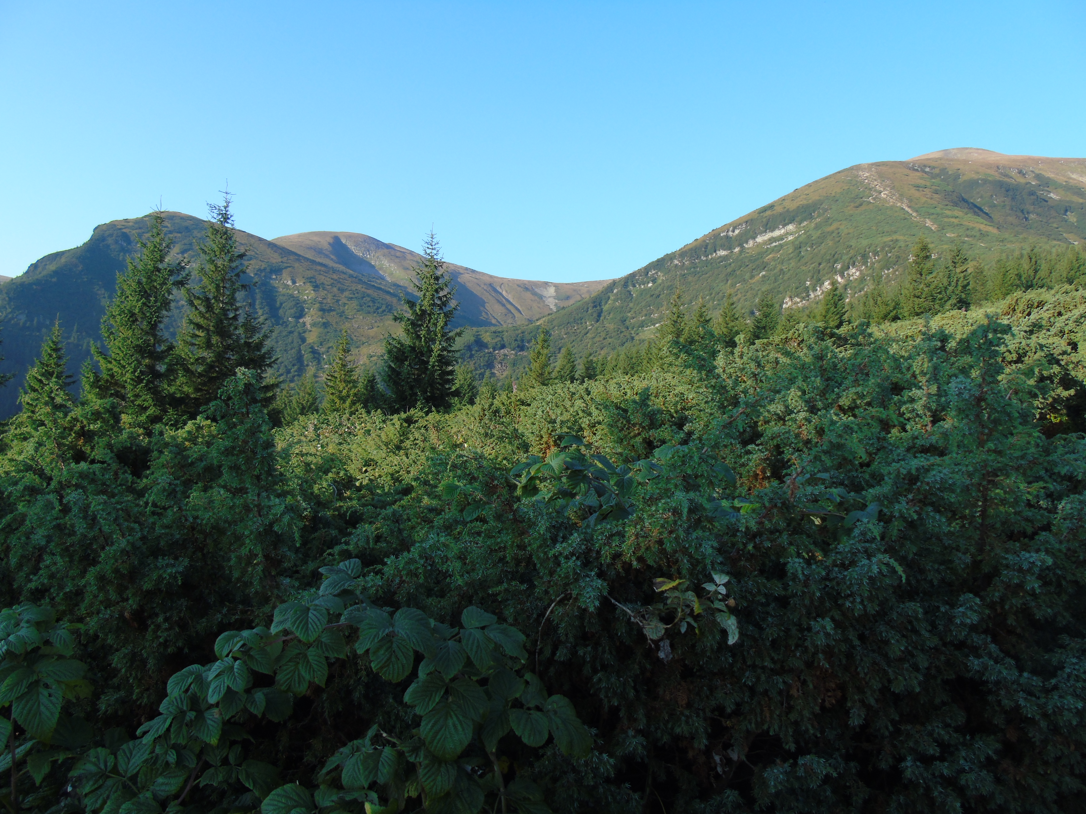 Карпатський, Яремчанська міська рада, Верховинський район, Надвірнянський район